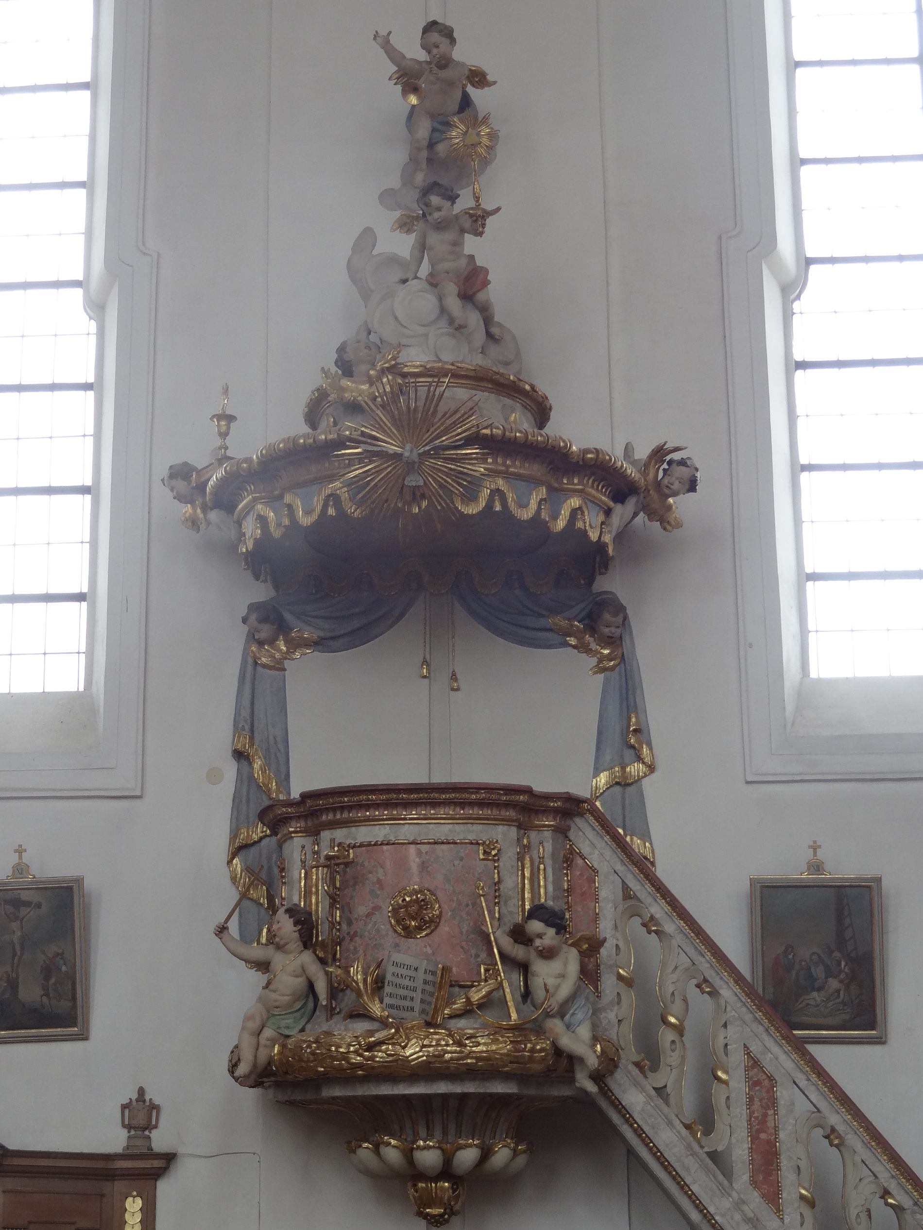 Rokoko-Kanzel der Pfarrkirche St. Nikolaus in Altfraunhofen (Lkr. Landshut)